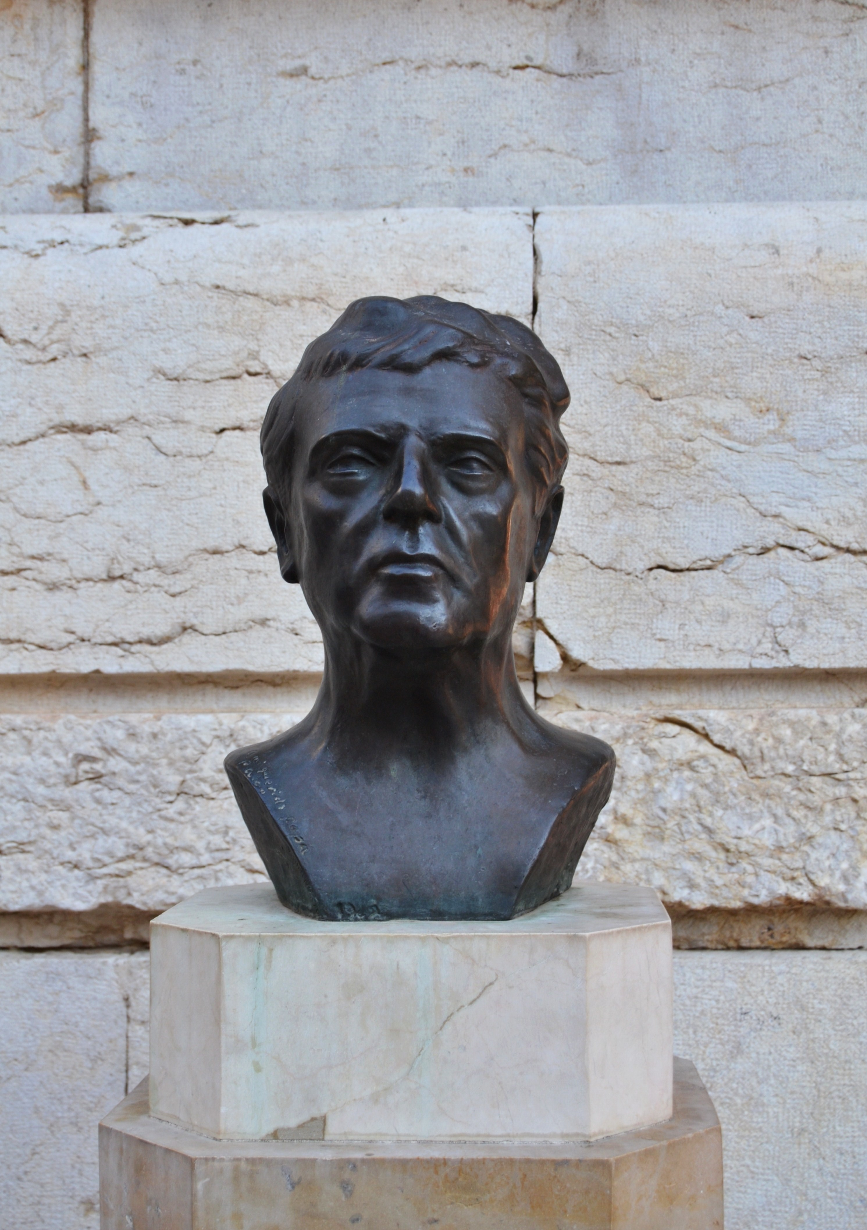 Bust de Francesc Mora i Berenguer al mercat de Colom, València.